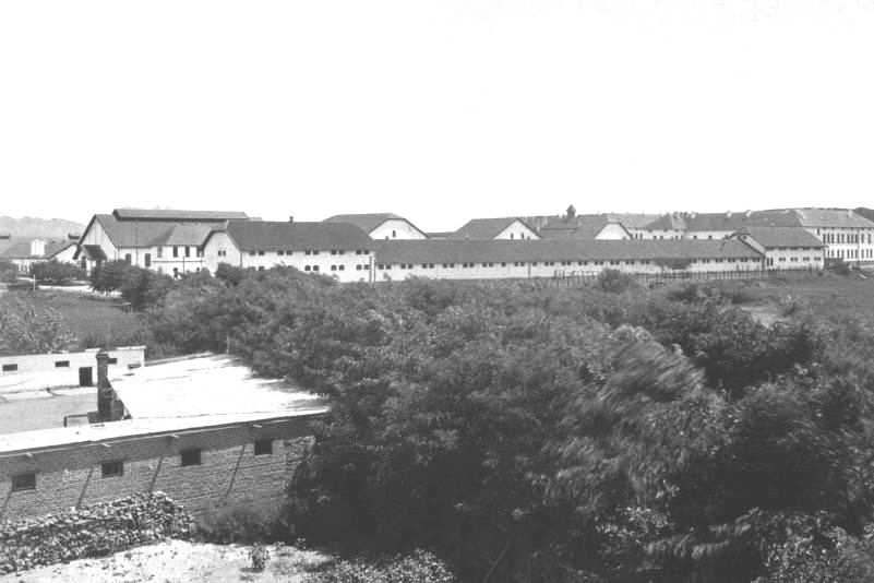 青岛毛奇兵营全景